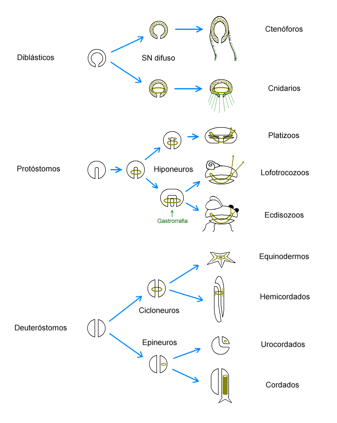 Principales planes corporales de los animales.